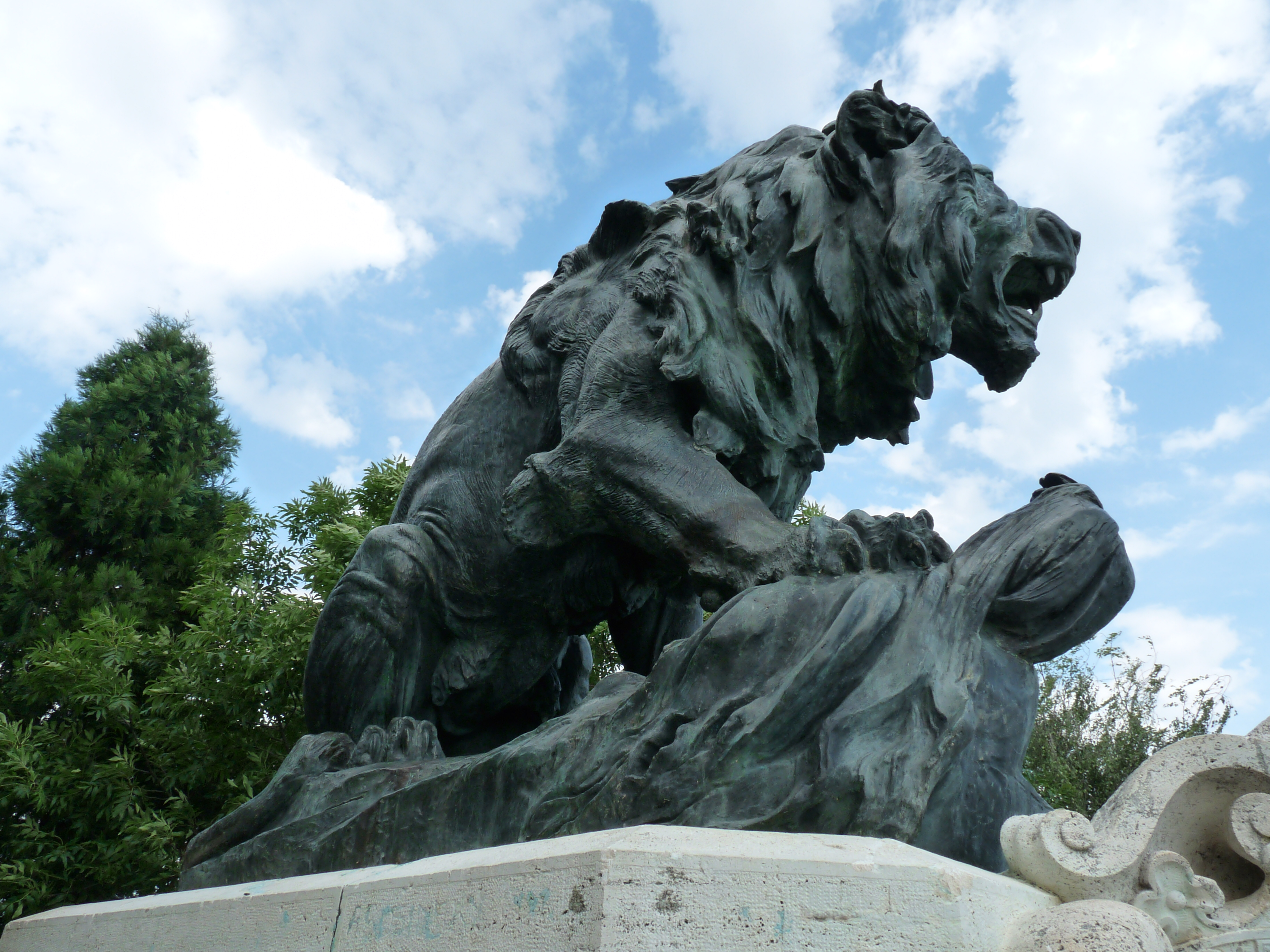 Pamätník obetiam bitky pri Vozokanoch,venovaný prvej víťaznej bitke proti Turkom na území Slovenska, 27. augusta 1652.